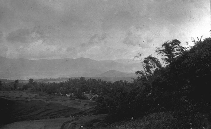 Foto. Uitzicht over de vlakte van Telaga in de afdeling Madjalengka, West-Java